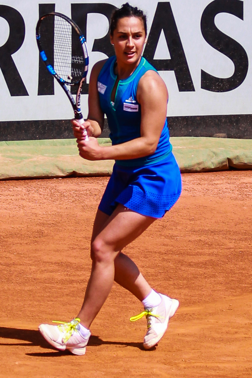 Martina Trevisan durante l'incontro tra Italia e Taiwan in Fedcup il 22 aprile 2017